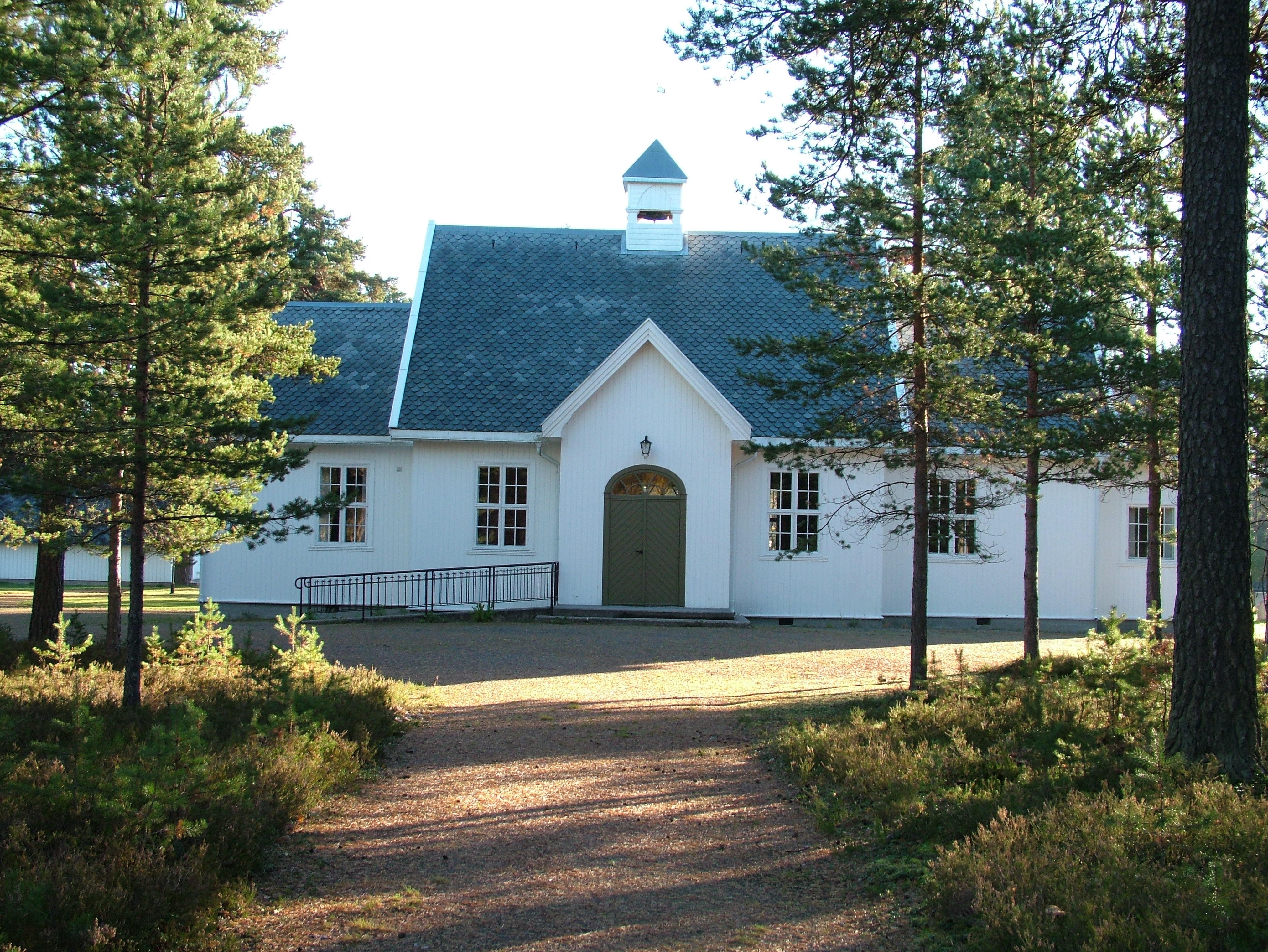 Magnor kirke i Eidskog